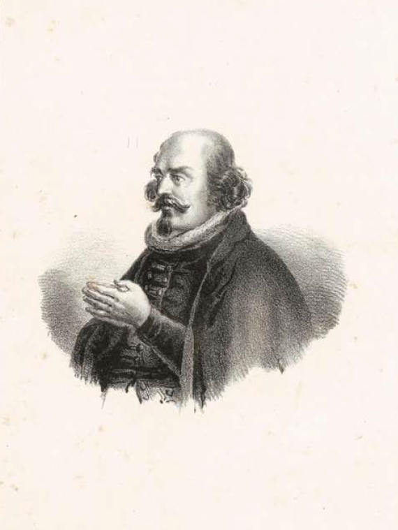 Dal Dizionario biografico degli uomini illustri di Sardegna di Pasquale Tola, 1837